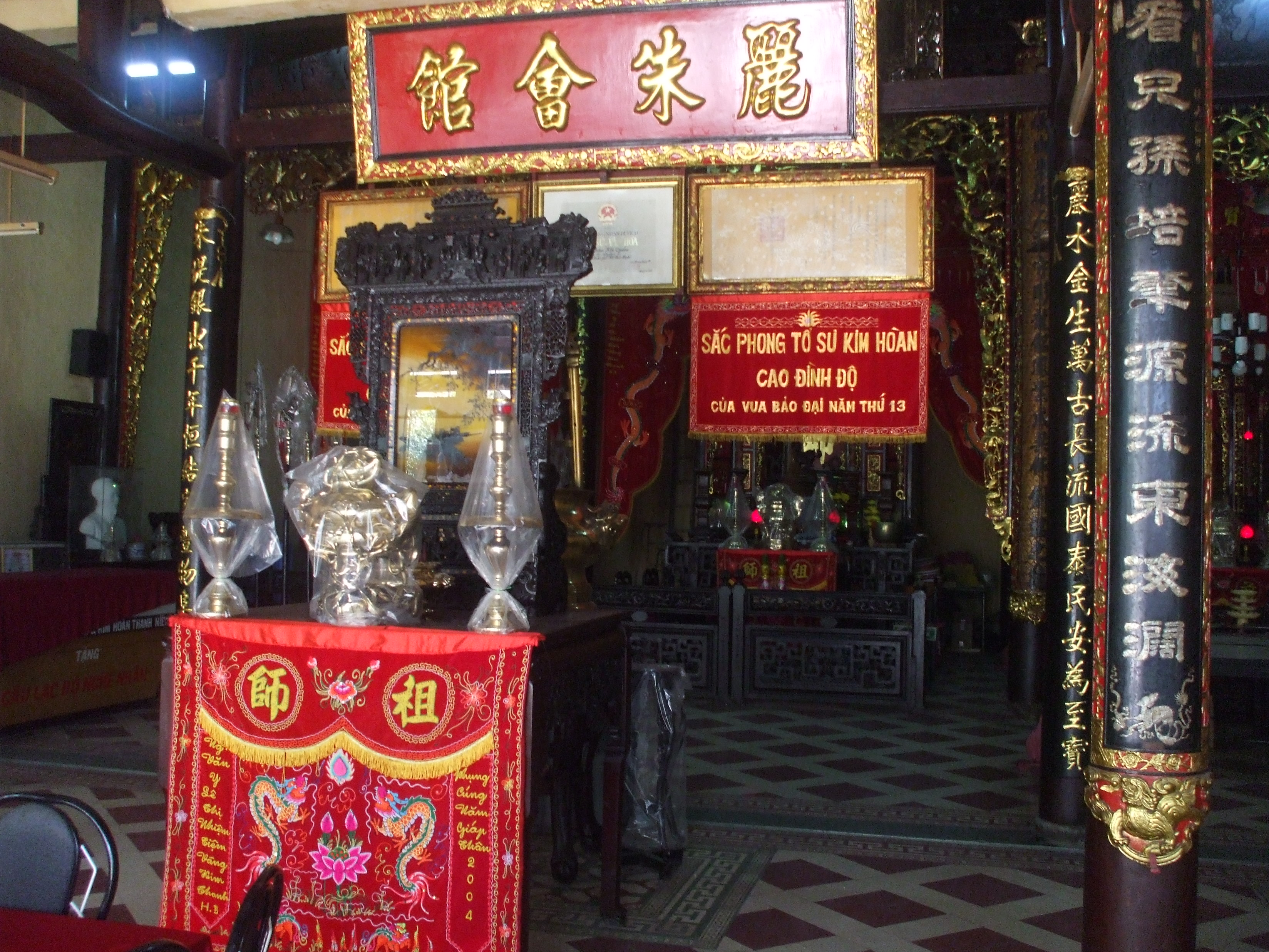 Chính điện Lệ Châu hội quán, quận 5, Thành phố Hồ Chí Minh.